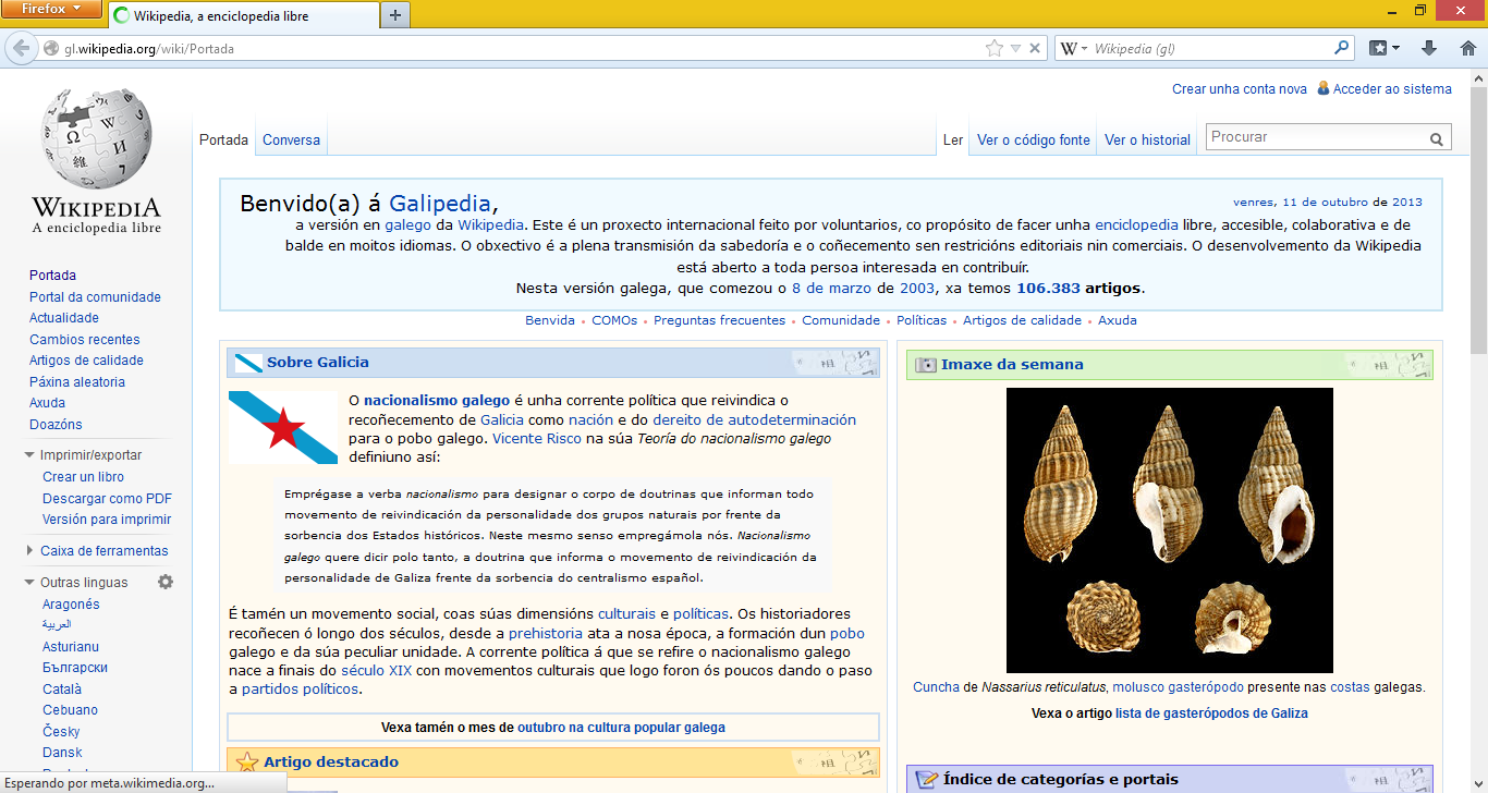 Firefox 24.0 en galego en Windows 8